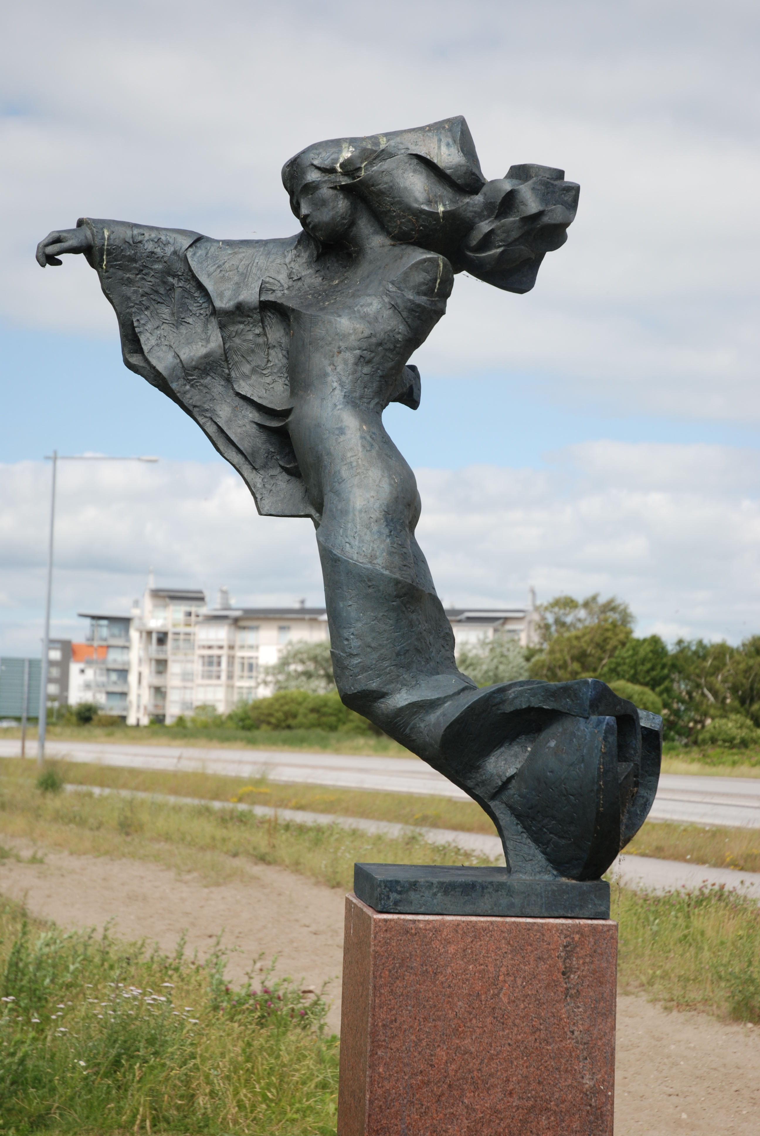 Peter Mandl´s Kassandra, bronze, 1996, Falsterbonäs Open Air Museum, Höllviken, Vellinge, Sweden